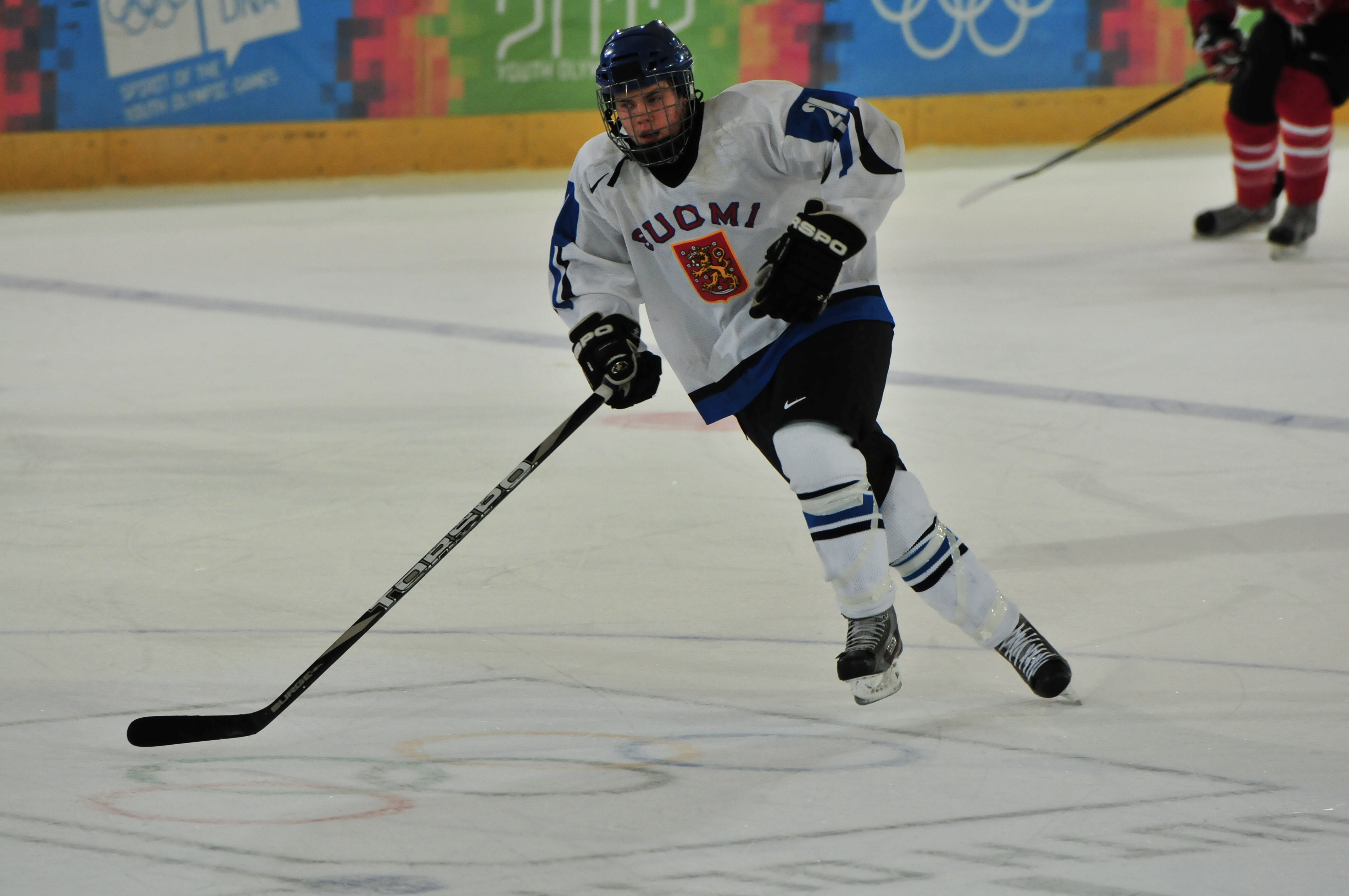 1. Jugendolympiade 2012 Innsbruck